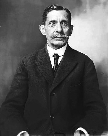 Baldomero Lillo Figueroa (Lota, 6 de enero de 1867 - San Bernardo, 10 de septiembre de 1923) cuentista chileno, considerado el maestro del género del realismo social en su país. Fotografía a los 41 años.